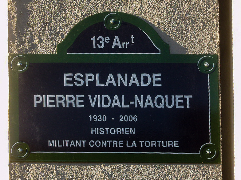 Paris 13e arrondissement - Esplanade Pierre-Vidal-Naquet - plaque de rue